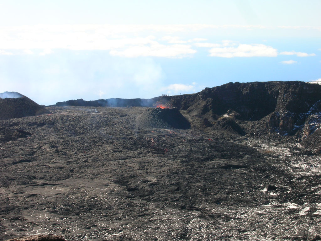 Nouveau cratère né le 10 octobre 2006 dans le cratère Dolomieu